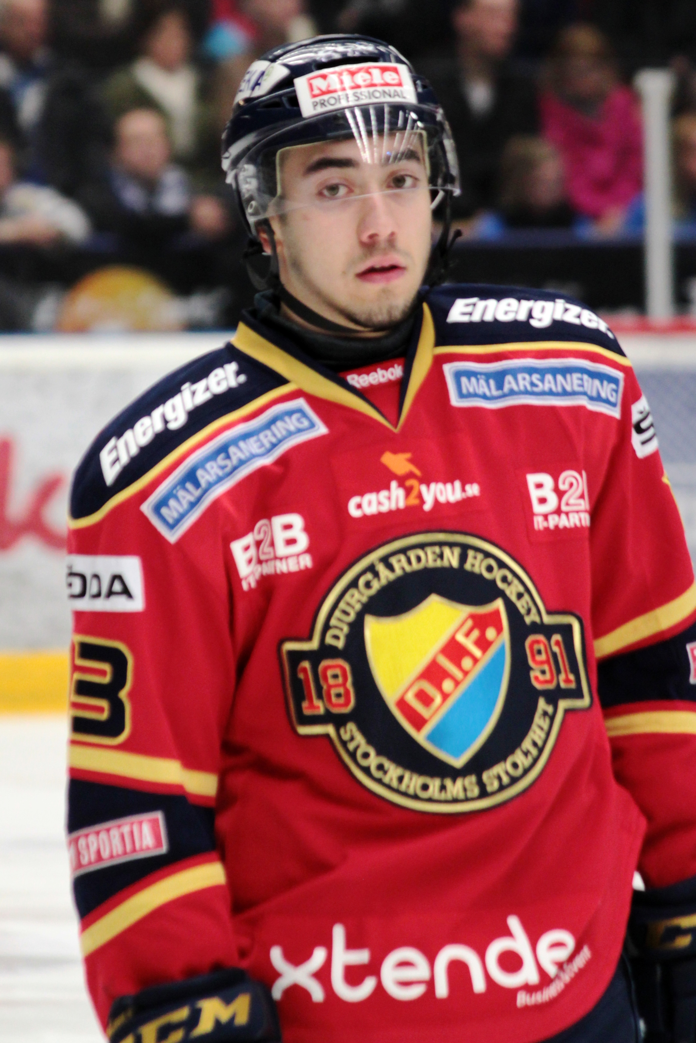 Mika Zibanejad i kvalmatchen mellan Leksands IF och Djurgårdens IF i Leksand 2012-03-31